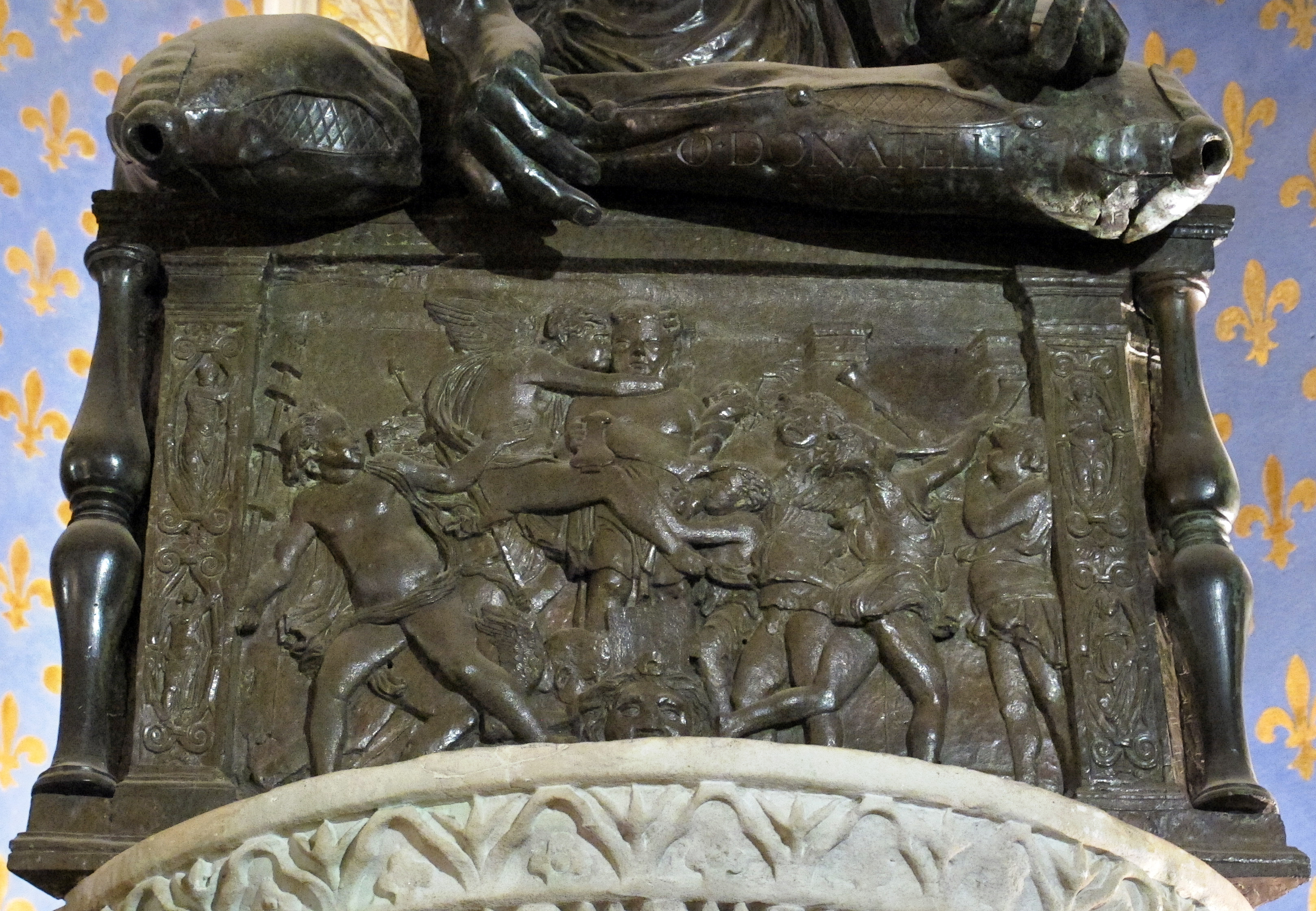 Palazzo Vecchio, Firenze